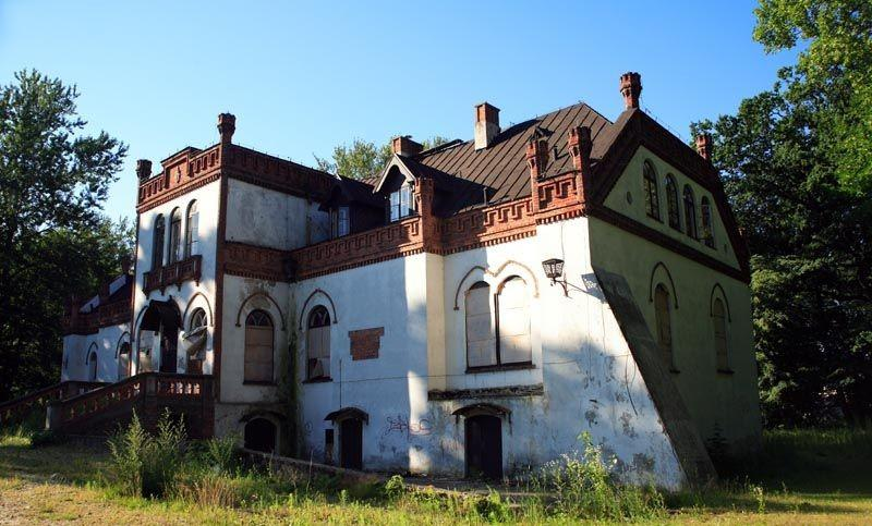 Ujazd - pałacyk Ostrowskich Ujazd, Poland by Ewa and Maek Wojciechowsy